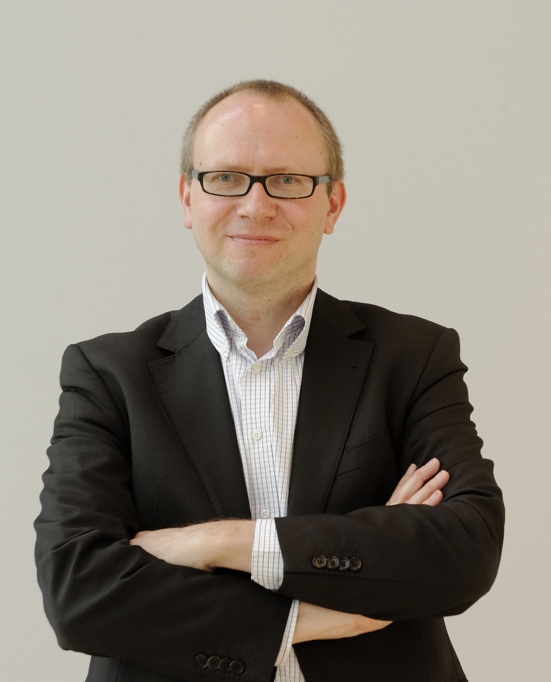 Rotary Klavierwettbewerb 2013